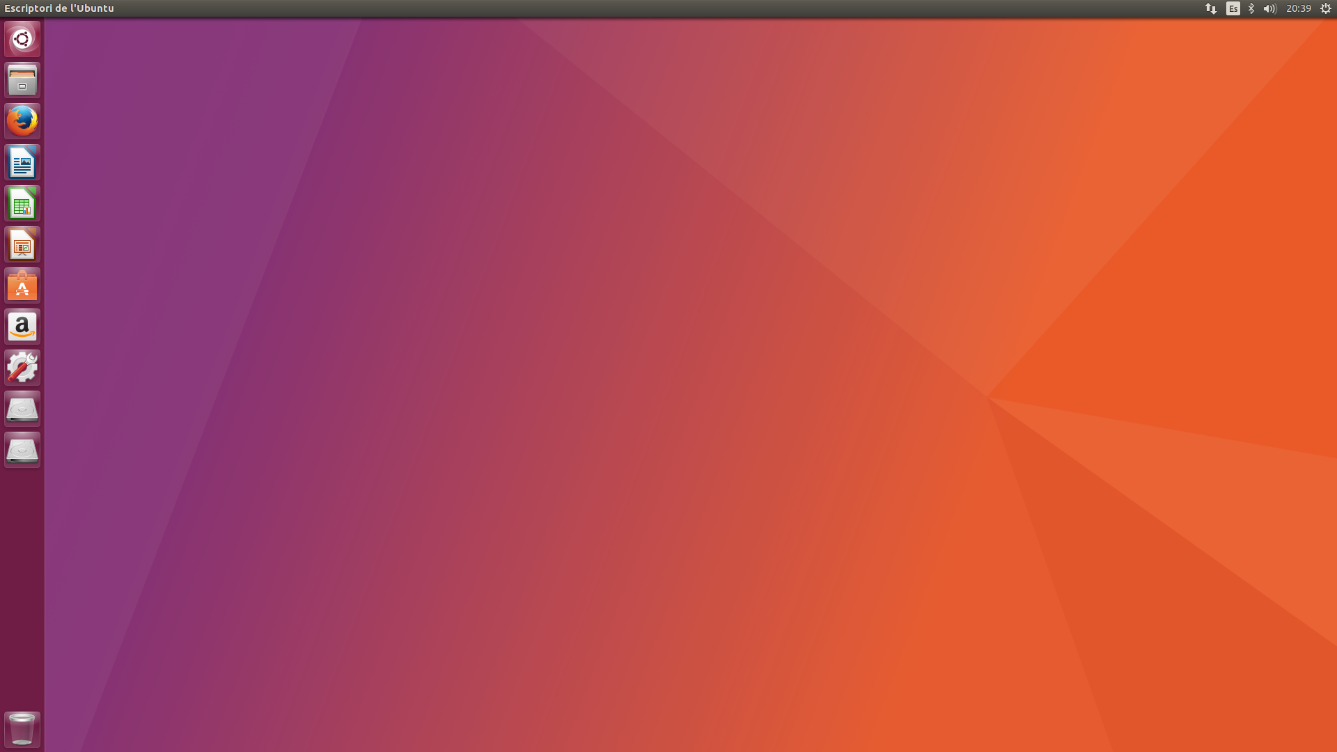 Captura de pantalla d'Ubuntu 17.04 en Català